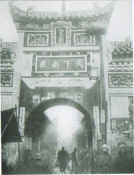 拍摄于民国初年的南岳牌坊